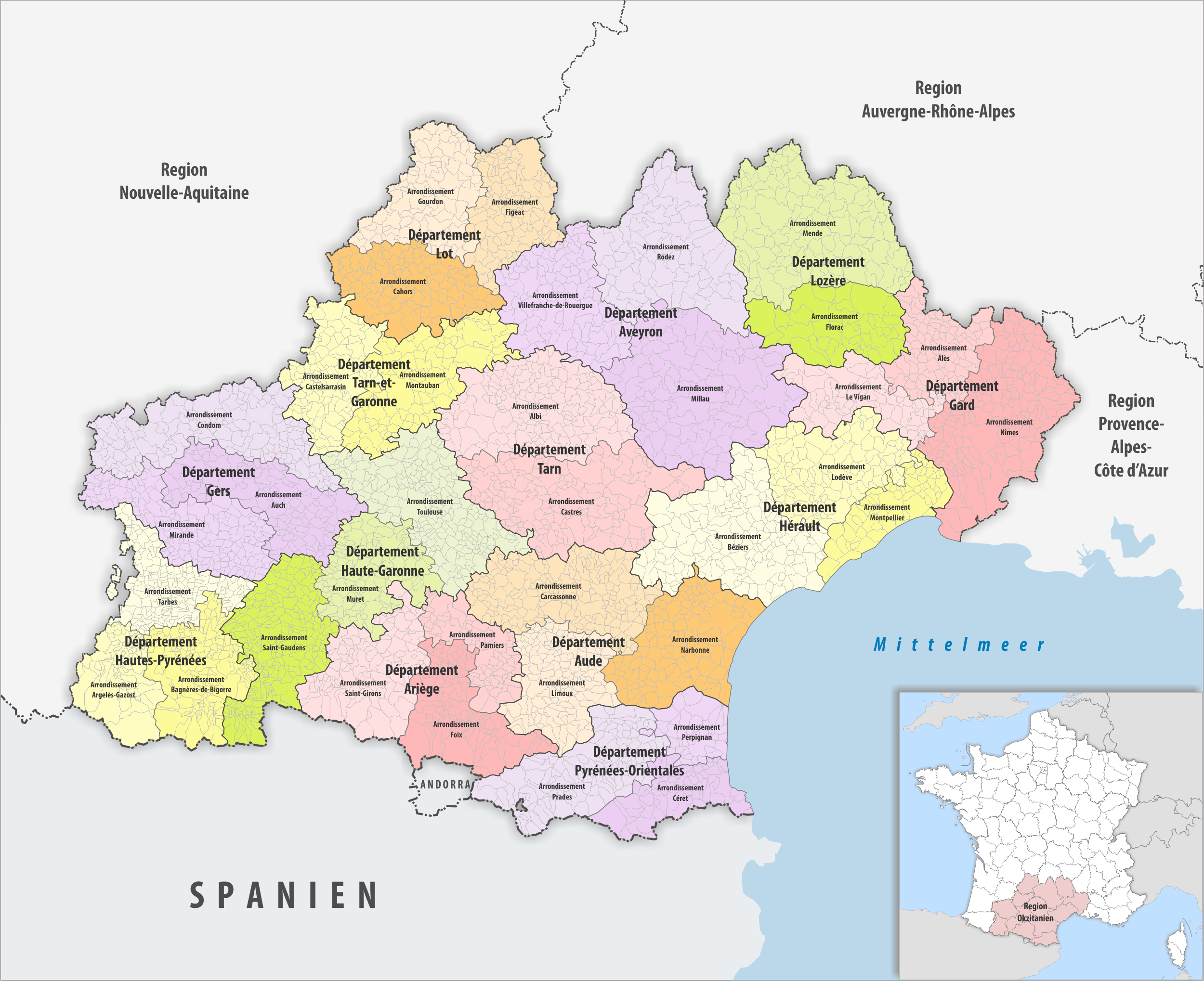 Gemeinden, Arrondissemente und Departemente in der Region Okzitanien